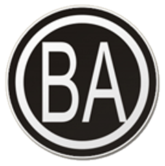 Logo von Ba FC